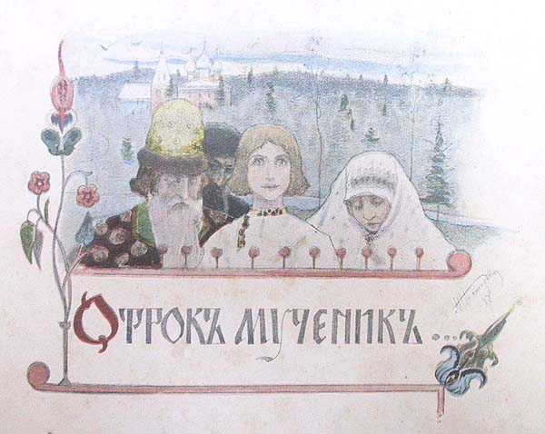 Иллюстрация к книге В. М. Михеева "Отрок мученик. Углицкое предание.", рассказывающей о ребёнке-мученике Иоанне Чеполосове.